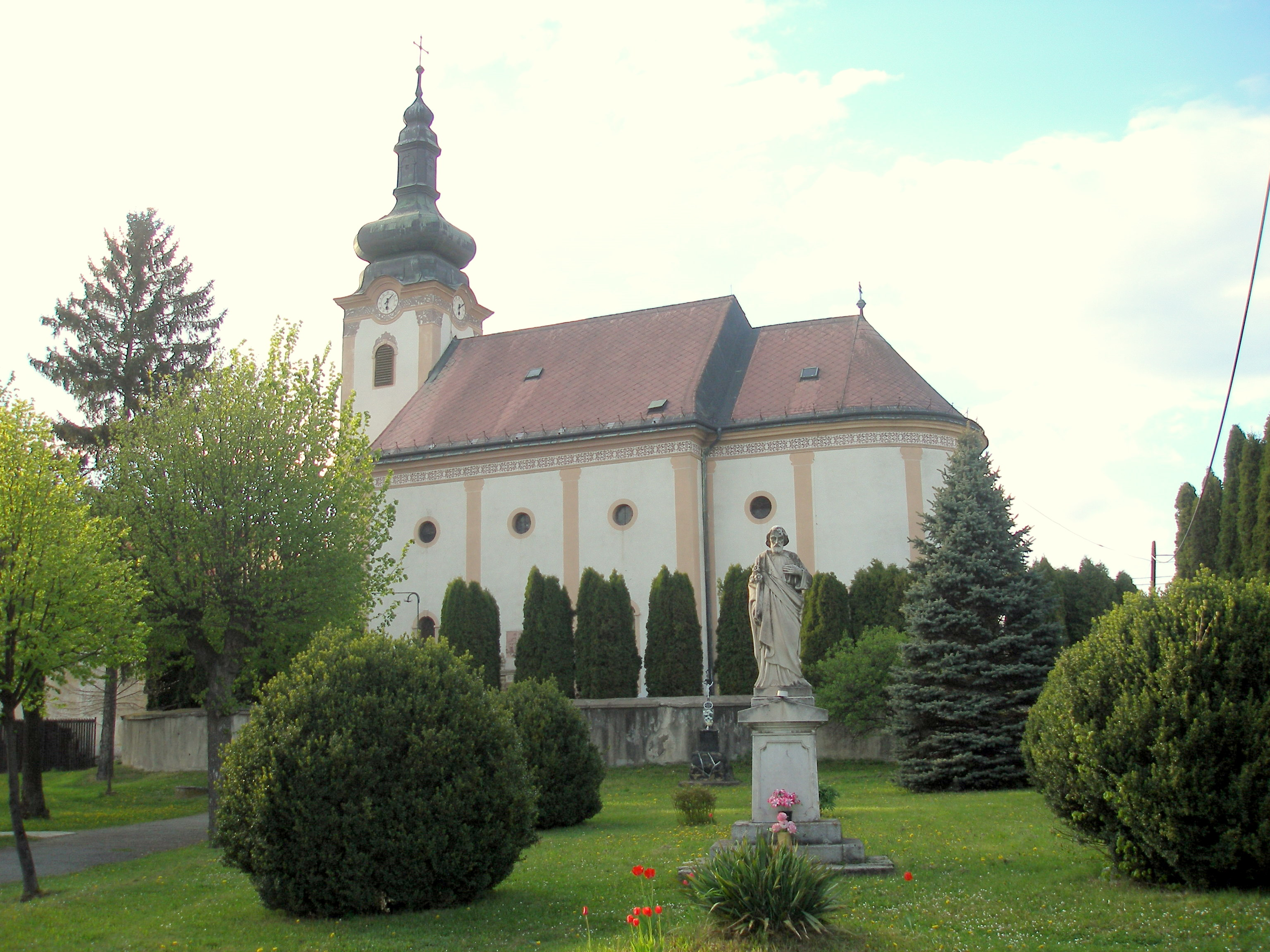 Obec Fintice okres Prešov, región Šariš. Rímskokatolícky kostol Navštívenia Panny Márie. Kostol so spojovacou chodbou ku kaštieľu, bol podľa údajov postavený v rokoch 1775-1778.